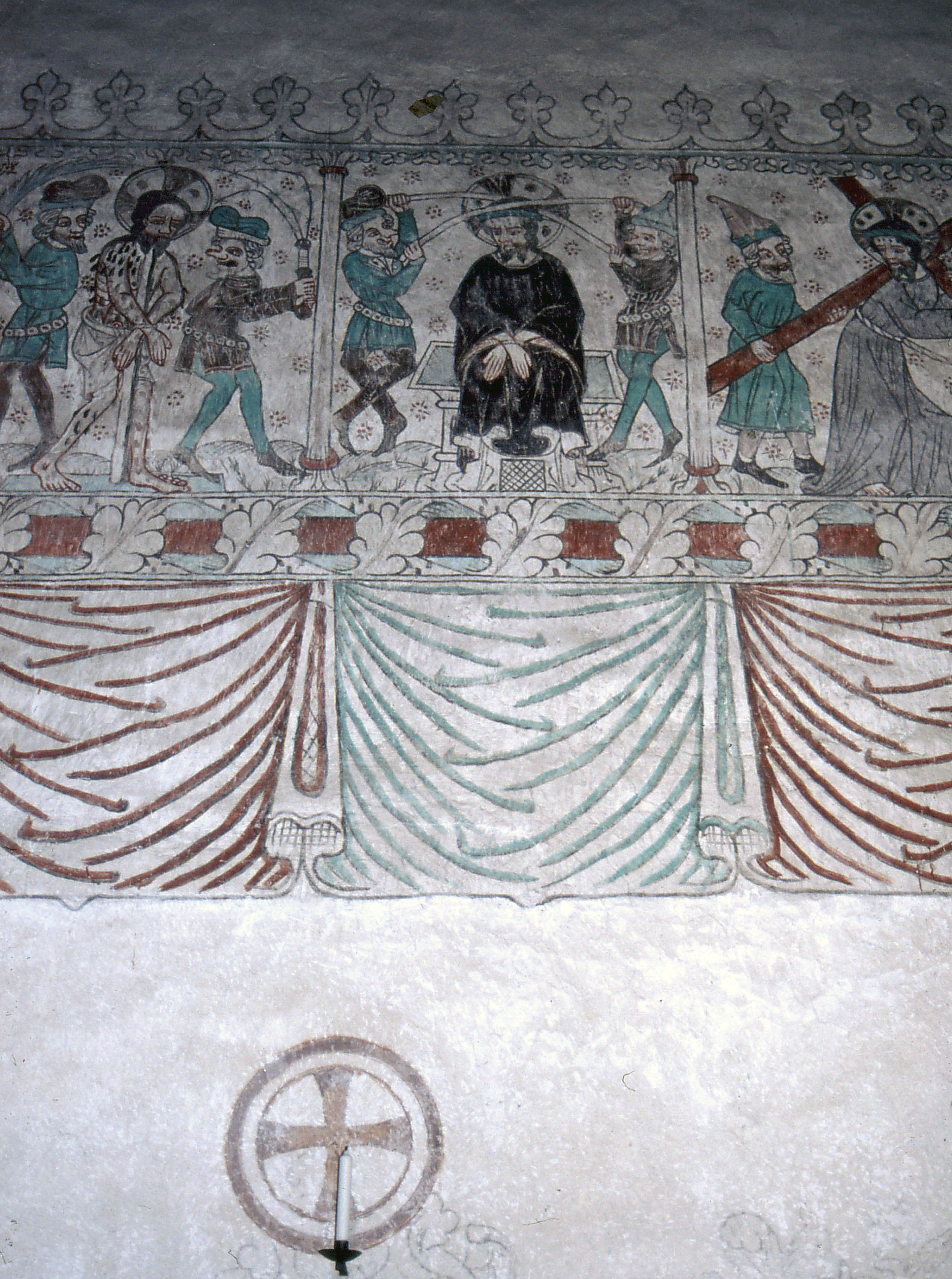 Ganthems kyrka.Passionsmästarens målning 1400-talet